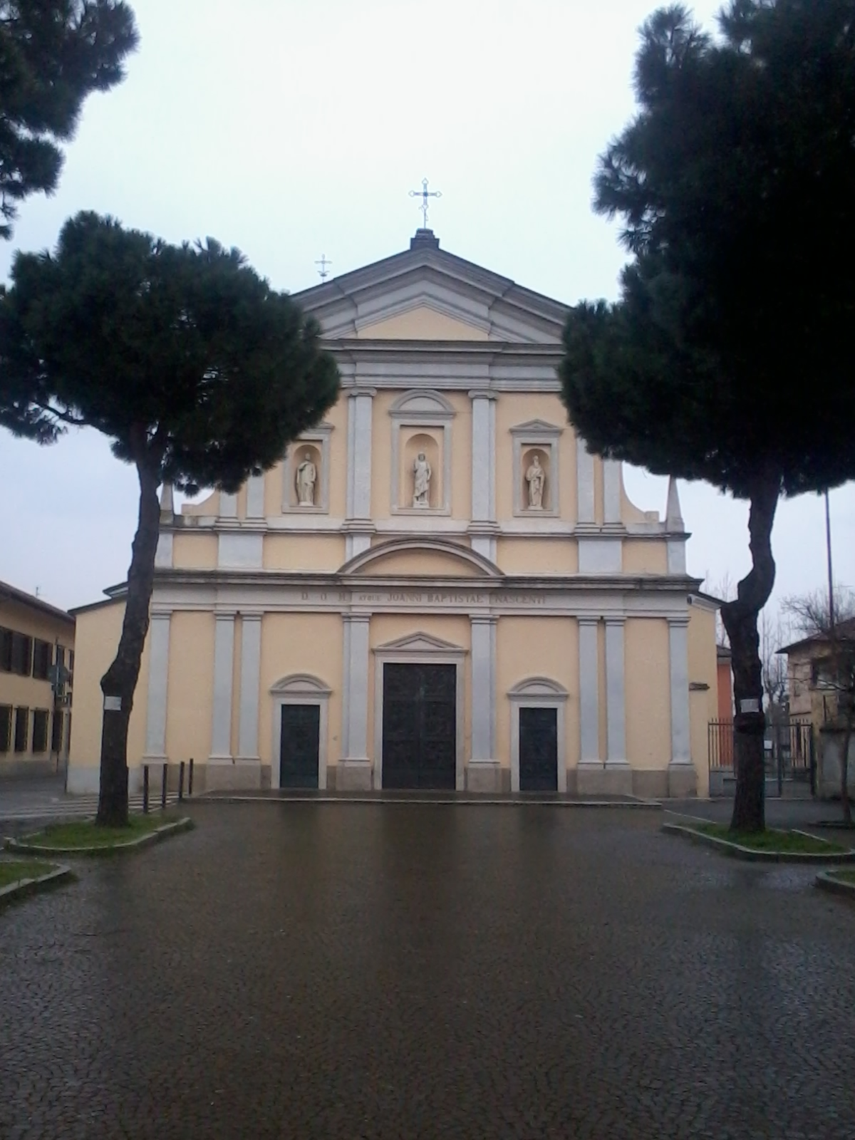 La chiesa parrocchiale di Cisliano (MI) - Italy